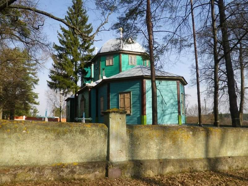 Гарадок (Глускі раён). Царква